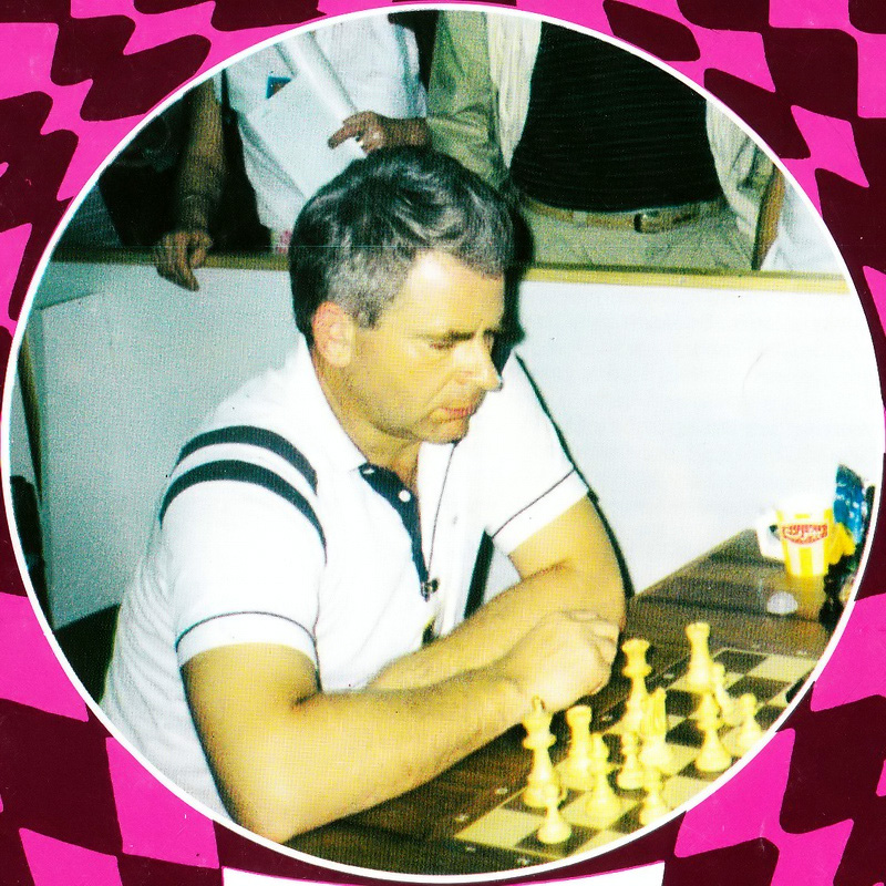 Borys Spasski, ros. Борис Васильевич Спасский, fr. Boris Spassky (ur. 30 stycznia 1937 w Sankt Petersburgu) – rosyjski szachista, dziesiąty mistrz świata w szachach, od roku 1978 obywatel Francji.